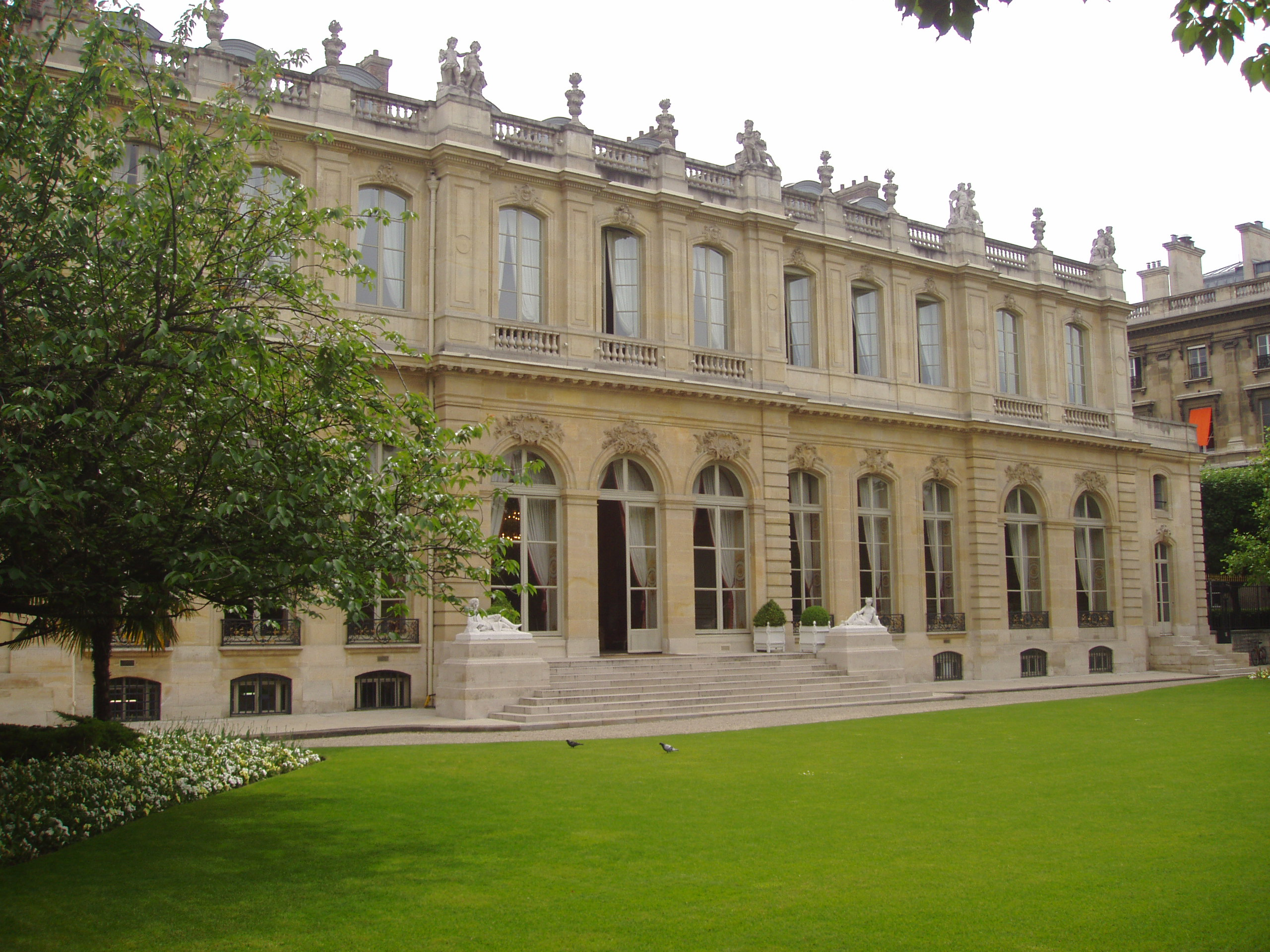 Hôtel de Lassay, coté jardin, Paris